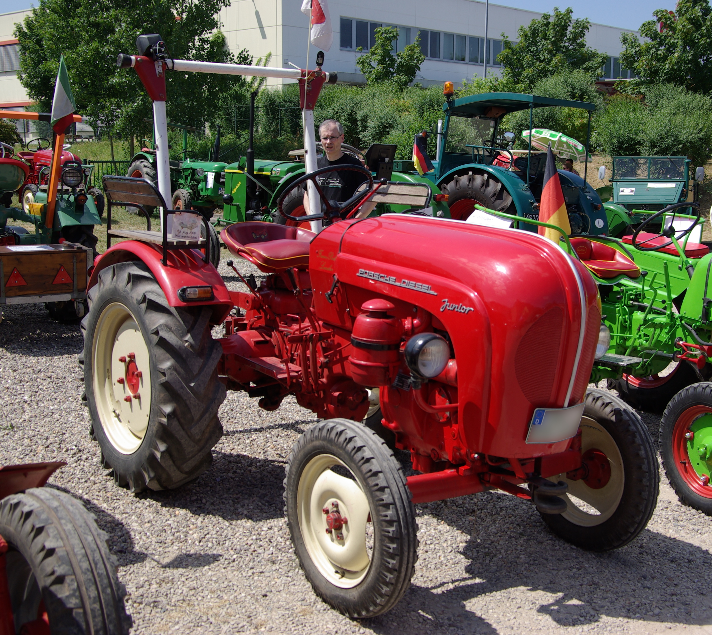 Porsche Junior 109, 1962, 15 PS, 29. Internationales Oldtimer-Treffen, Konz